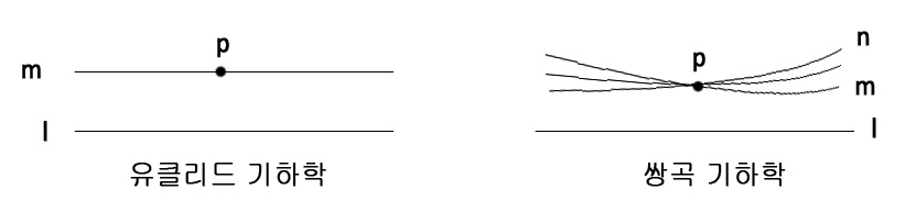 한 점을 지나고 한 직선에 평행한 다른 직선들을 유클리드기하학과 쌍곡기하학으로 나타낸 것